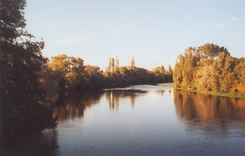 Date : 9 octobre 2004, vers 18 h 00 Source : photo personnelle d'archeos Description : la Vienne à Cubord, photo prise du pont, vers le nord Autres descripteurs : rivière ; rive ; ripisylve ; Licence